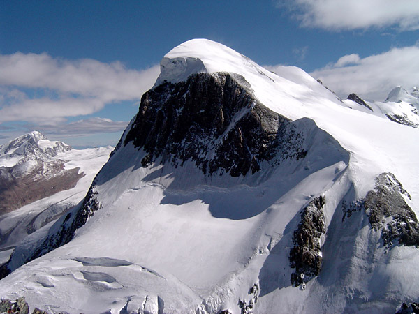 Breithorn, Switzerland